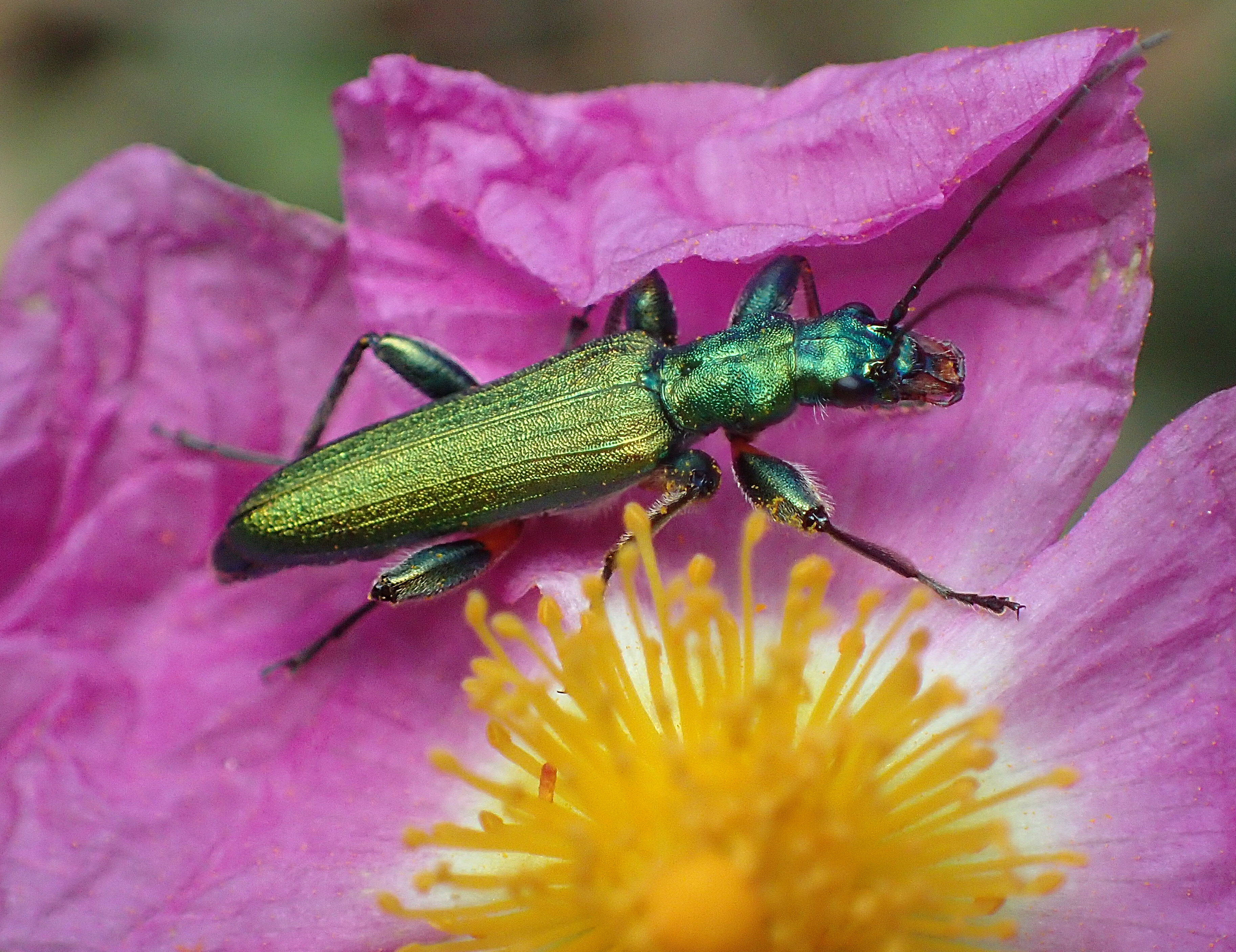 Chrysanthia varipes aus Griechenland